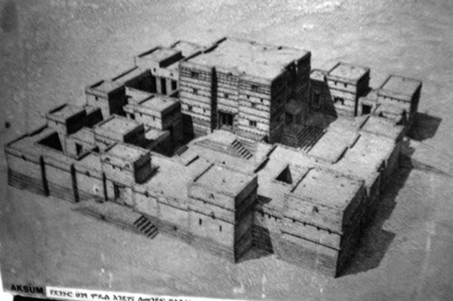 Reconstruction/ Vue d'artiste du site de Dungur, Axoum, Éthiopie - Musée national d'Addis Abeba